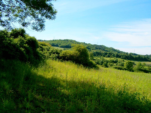 Countryside near Vrčin, Serbia/La campagne près de Vrčin, Serbie